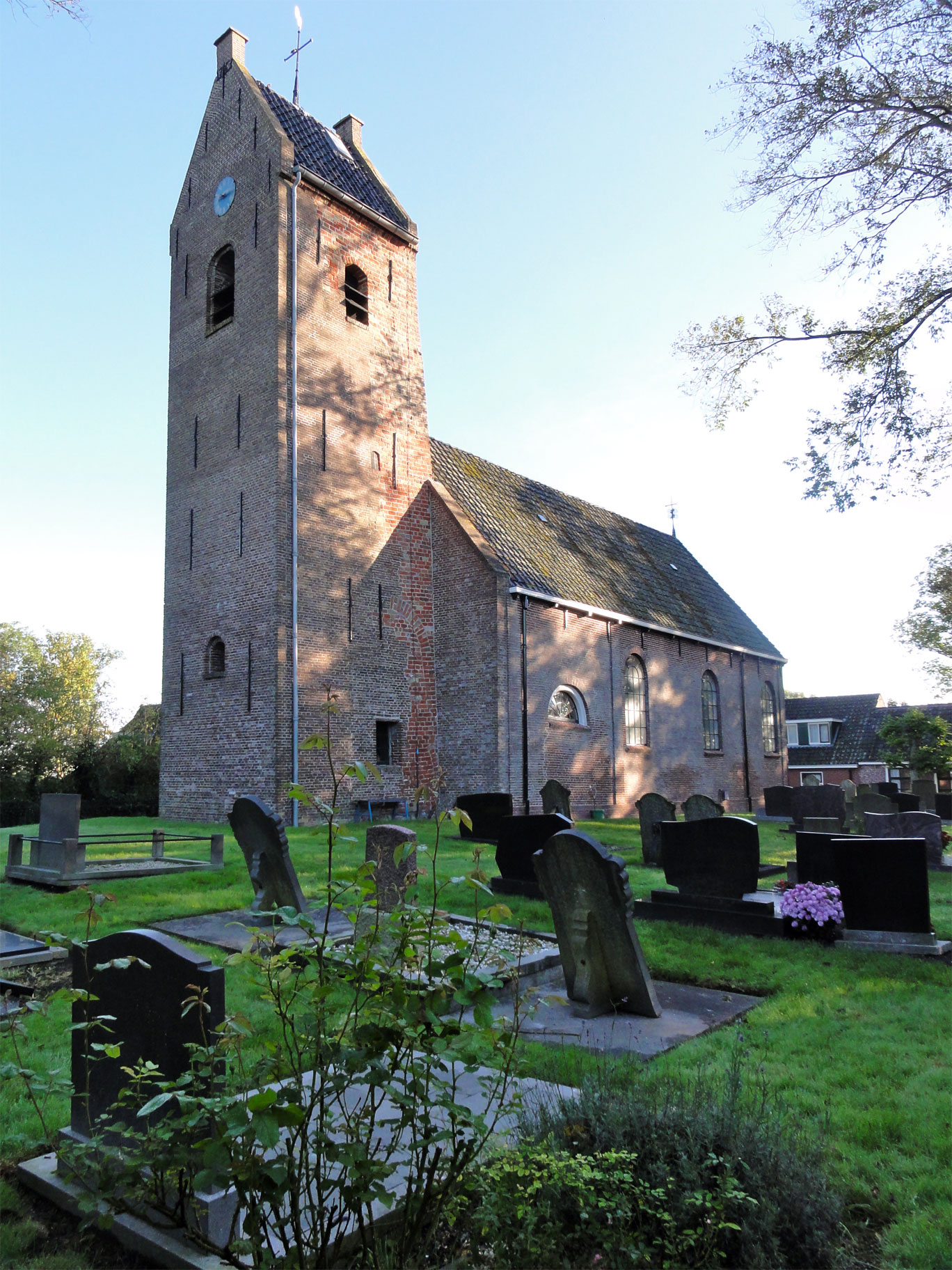 Mariakerk van Foudgum (rijksmonument) aan het Piet Paaltjenspad, van 1859 tot 1862 de kerk van ds. François Haverschmidt